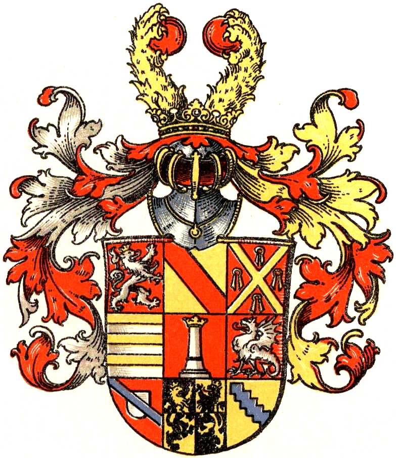 Wappen der Grafen von Bronchorst-Batenburg